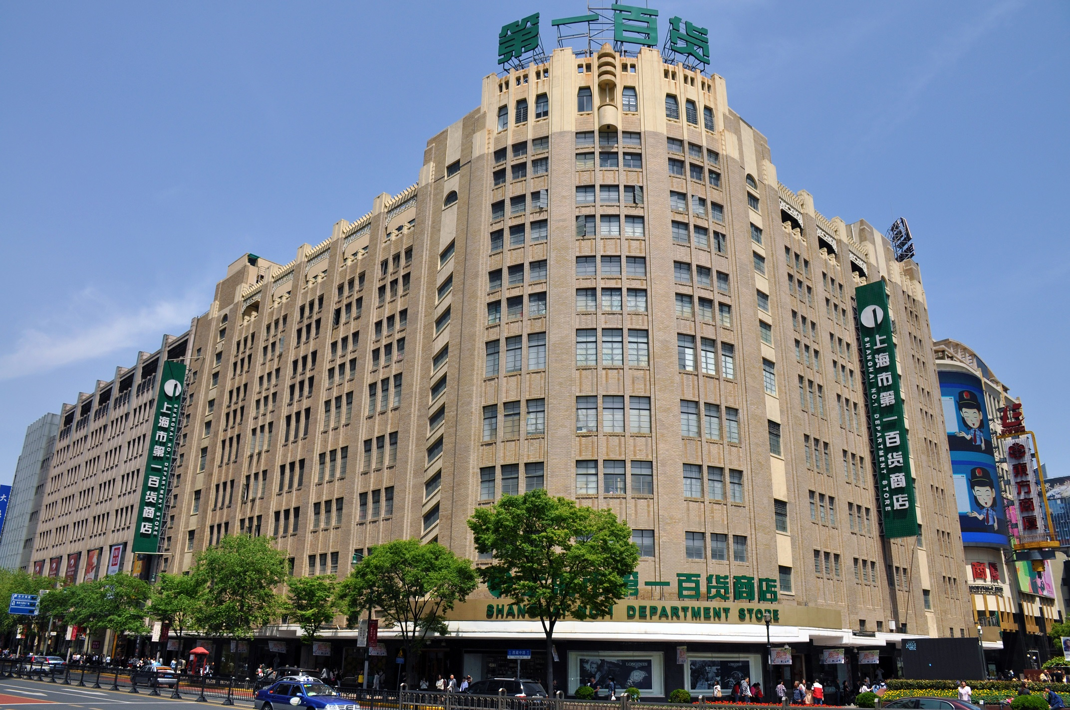 中文（中国大陆）: 大新公司 第一百货商店 南京东路830号 1934年